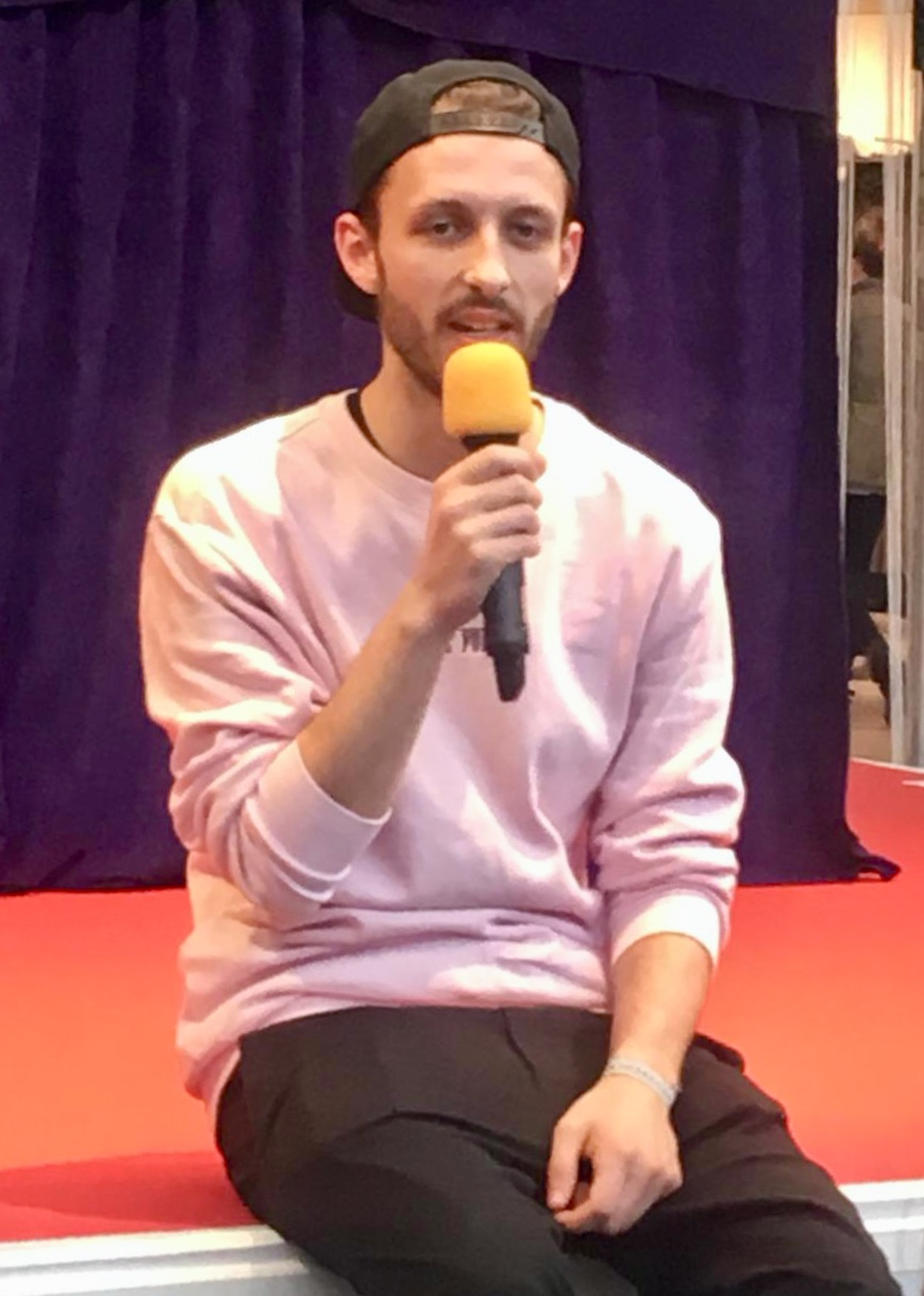 Nilsen live bei der Familiensause im famila Einkaufsland Wechloy (2018)